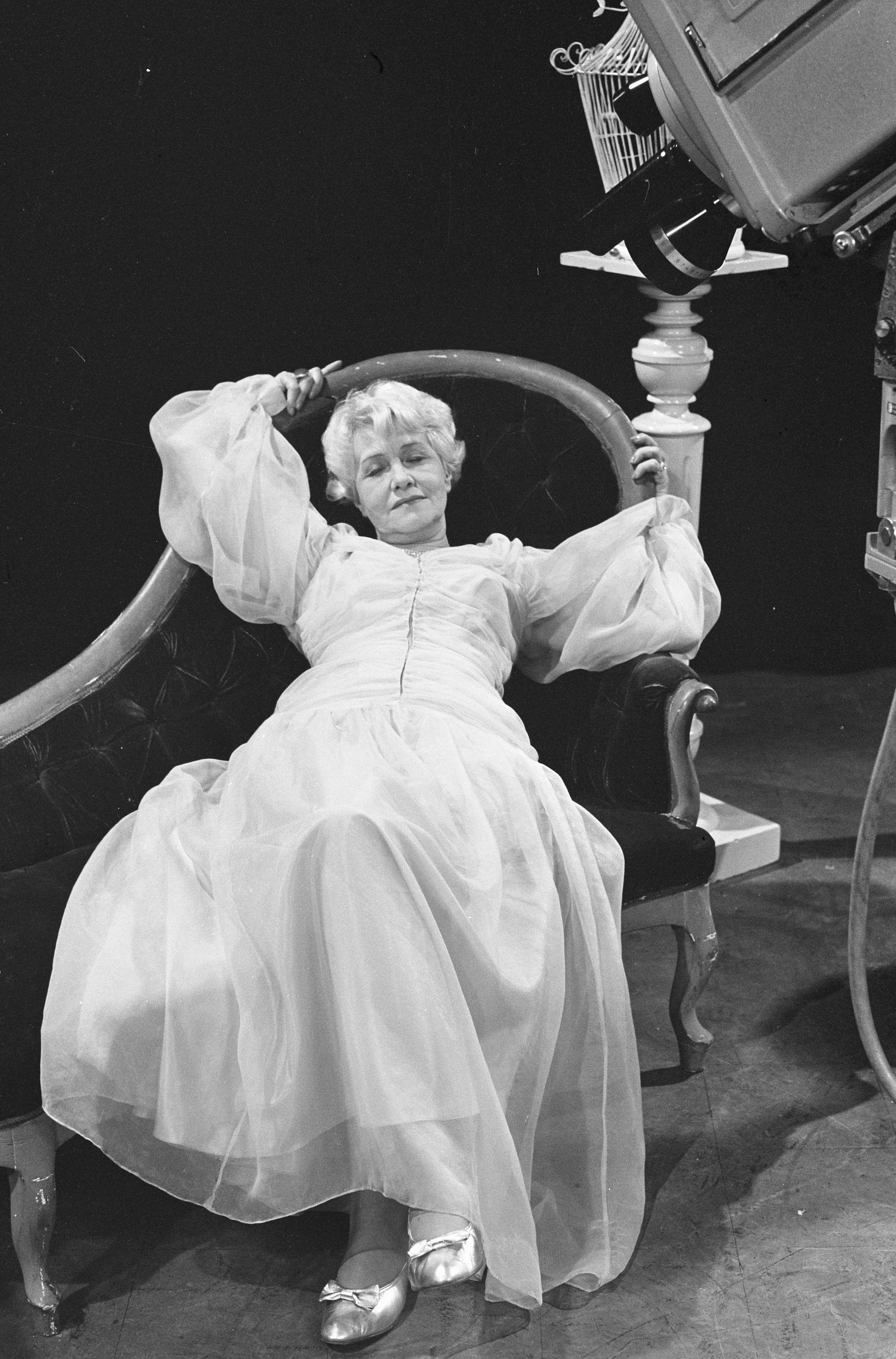 Collectie / Archief : Fotocollectie Anefo Reportage / Serie : [ onbekend ] Beschrijving : Televisiespel "Wensdroom" van Dora Paulsen. Op rustbank Datum : 16 november 1961 Trefwoorden : actrices, televisie, televisiespellen, toneel, zangeressen Persoonsnaam : Paulsen, Dora Fotograaf : Koch, Eric / Anefo Auteursrechthebbende : Nationaal Archief Materiaalsoort : Negatief (zwart/wit) Nummer archiefinventaris : bekijk toegang 2.24.01.05 Bestanddeelnummer : 913-1909